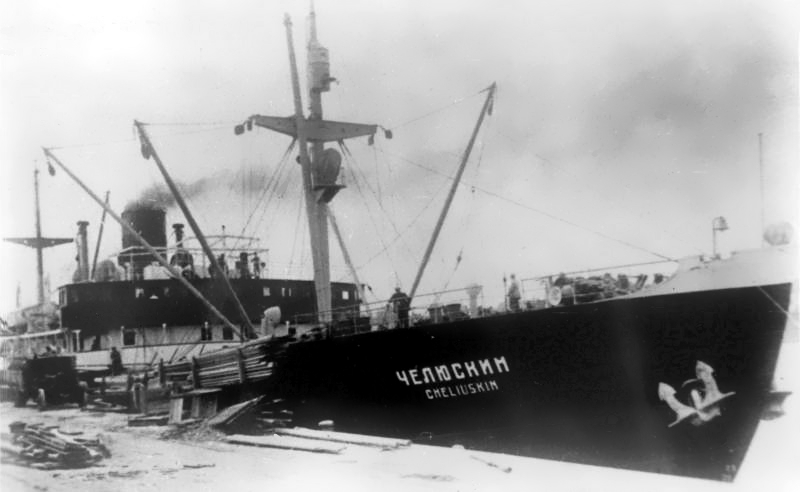 Более точное фото